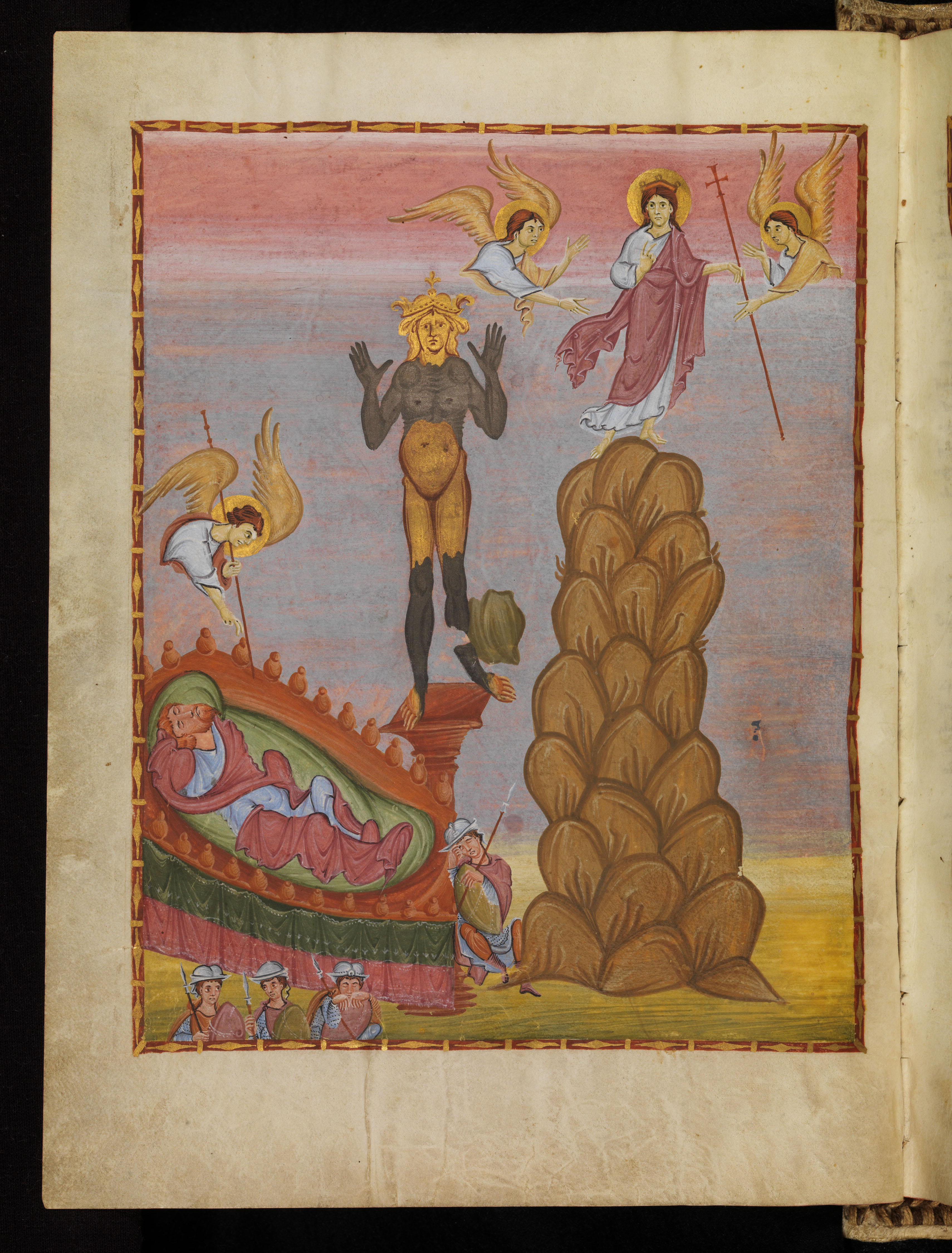 Der Traum des Nebukadnezarn